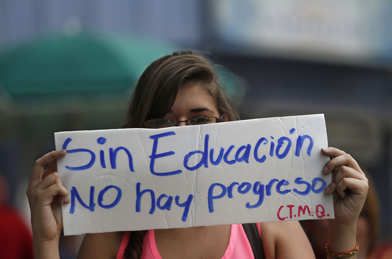 "Sin educación no hay progreso". Cobertura del evento por parte del Periódico La Nación.